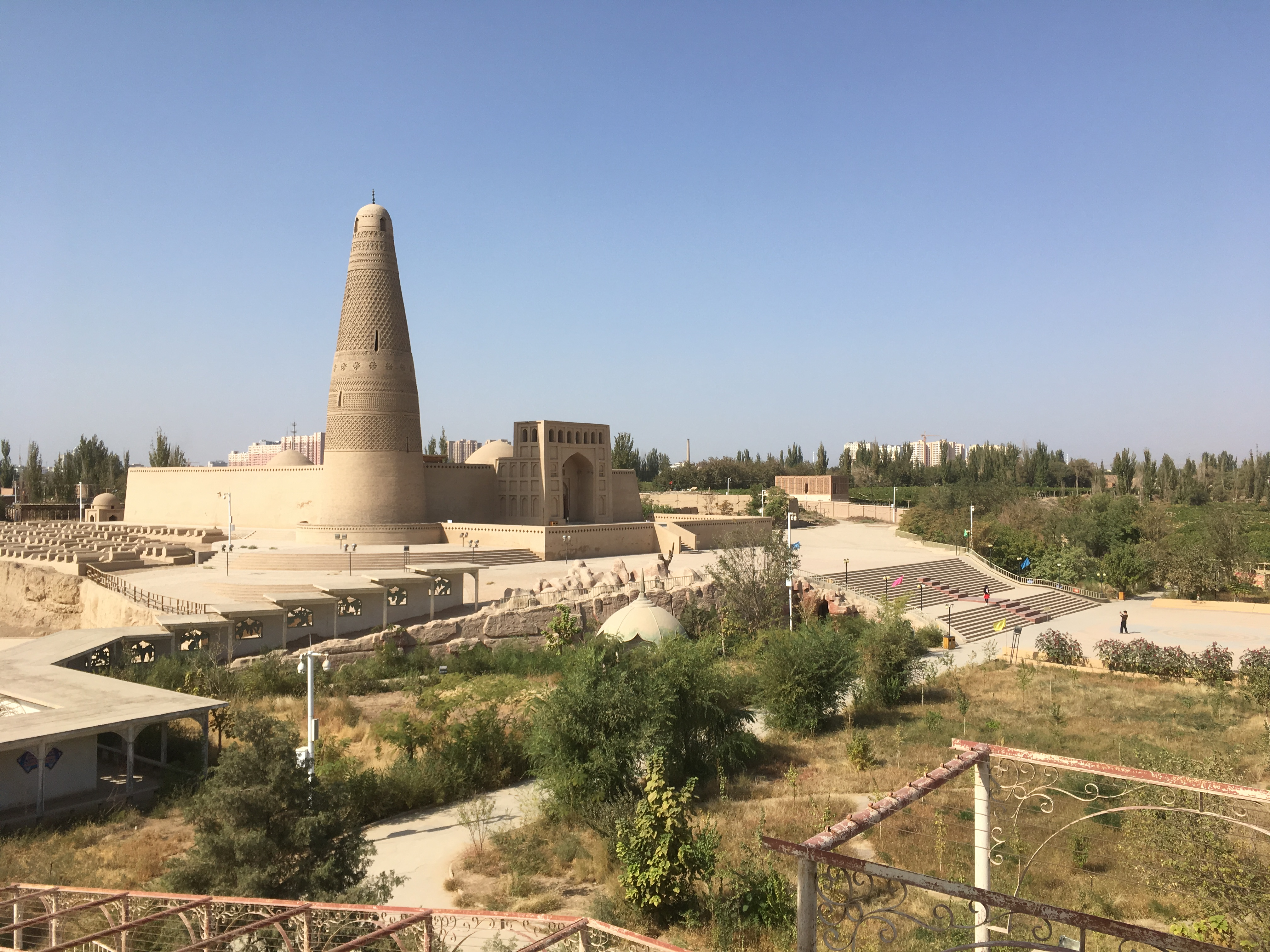 Emin Minarett von einem nahegelegenen Art Aussichtsturm